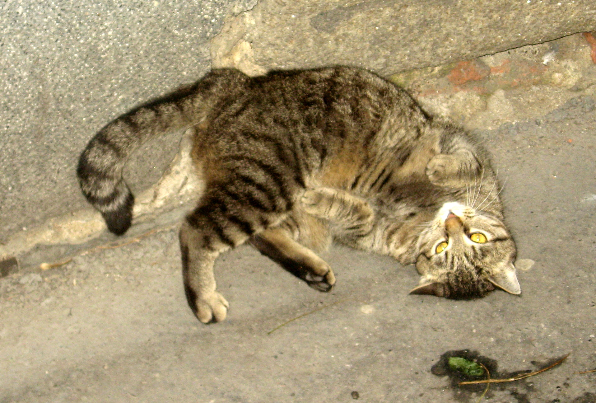 Kočka domácí